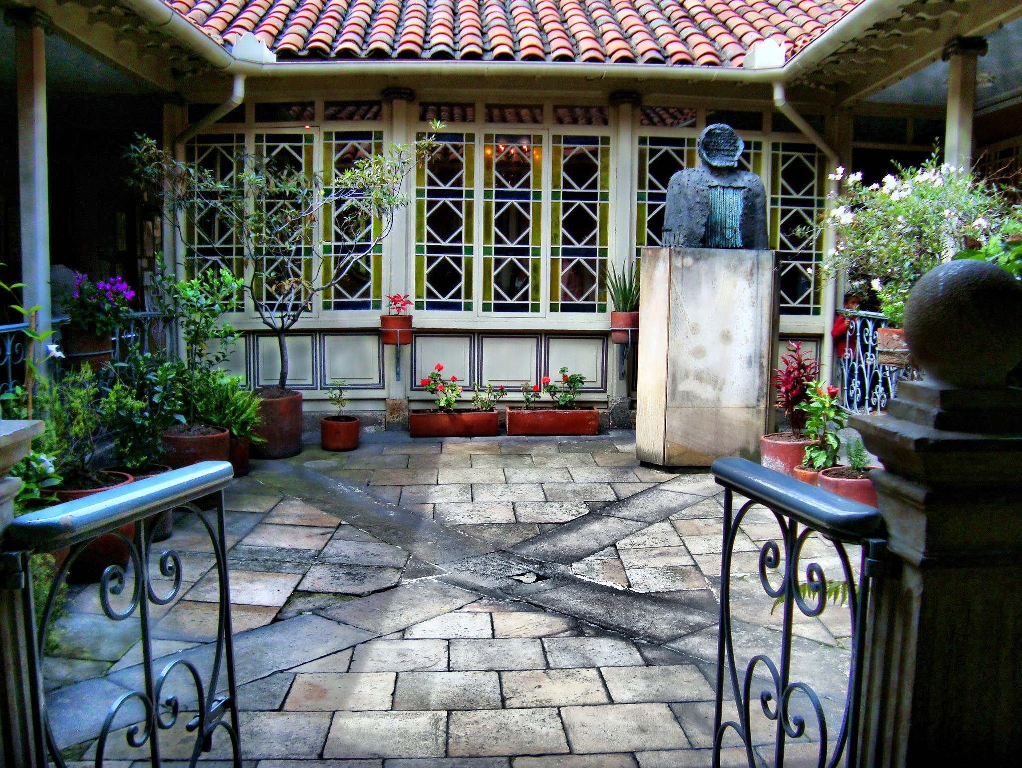 Casa de Poesía Silva